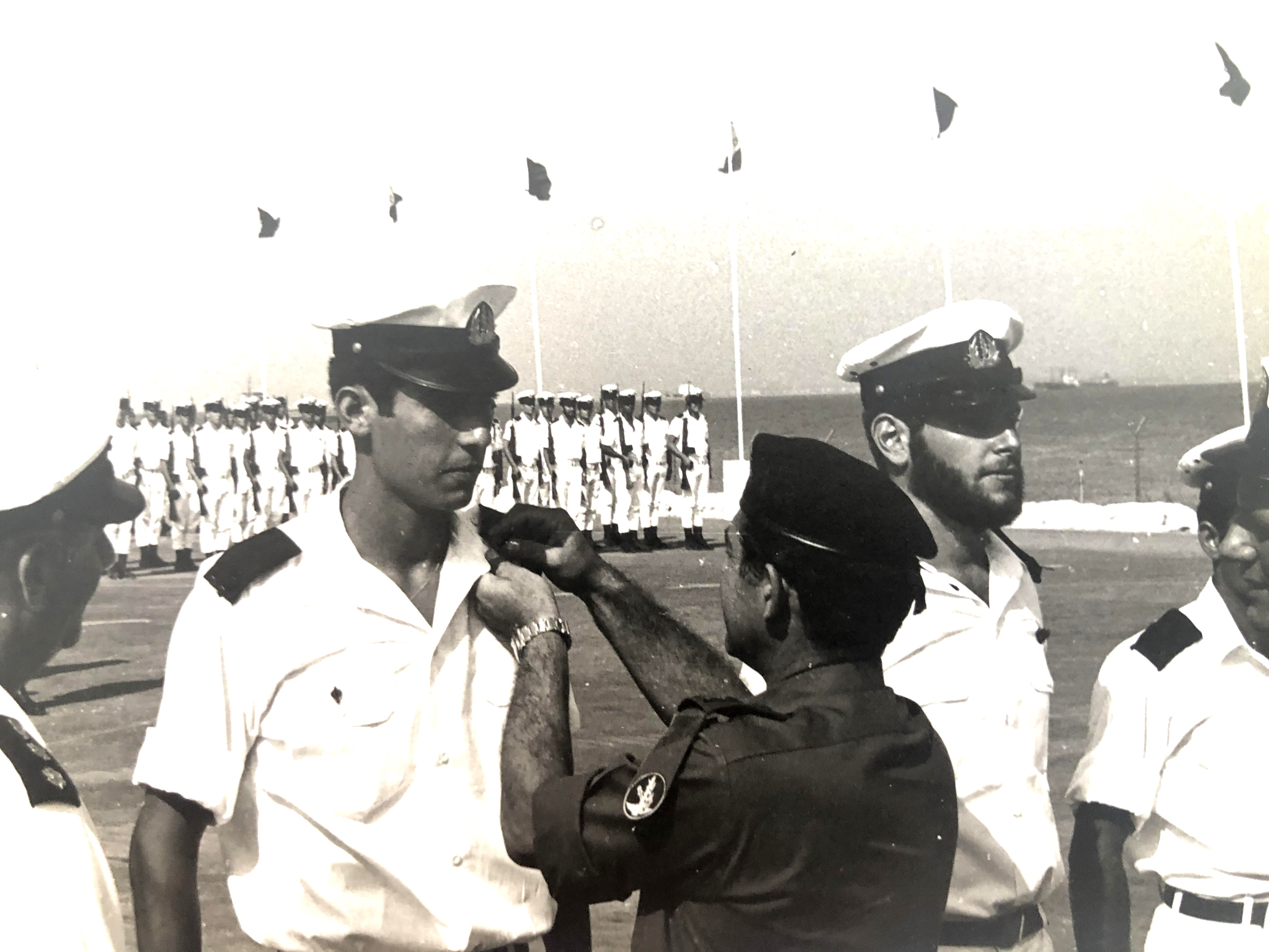 הרמטכ"ל דוד אלעזר חושף דרגות למצטיינים אלי רונן דרור אלוני ויעקב דאהן